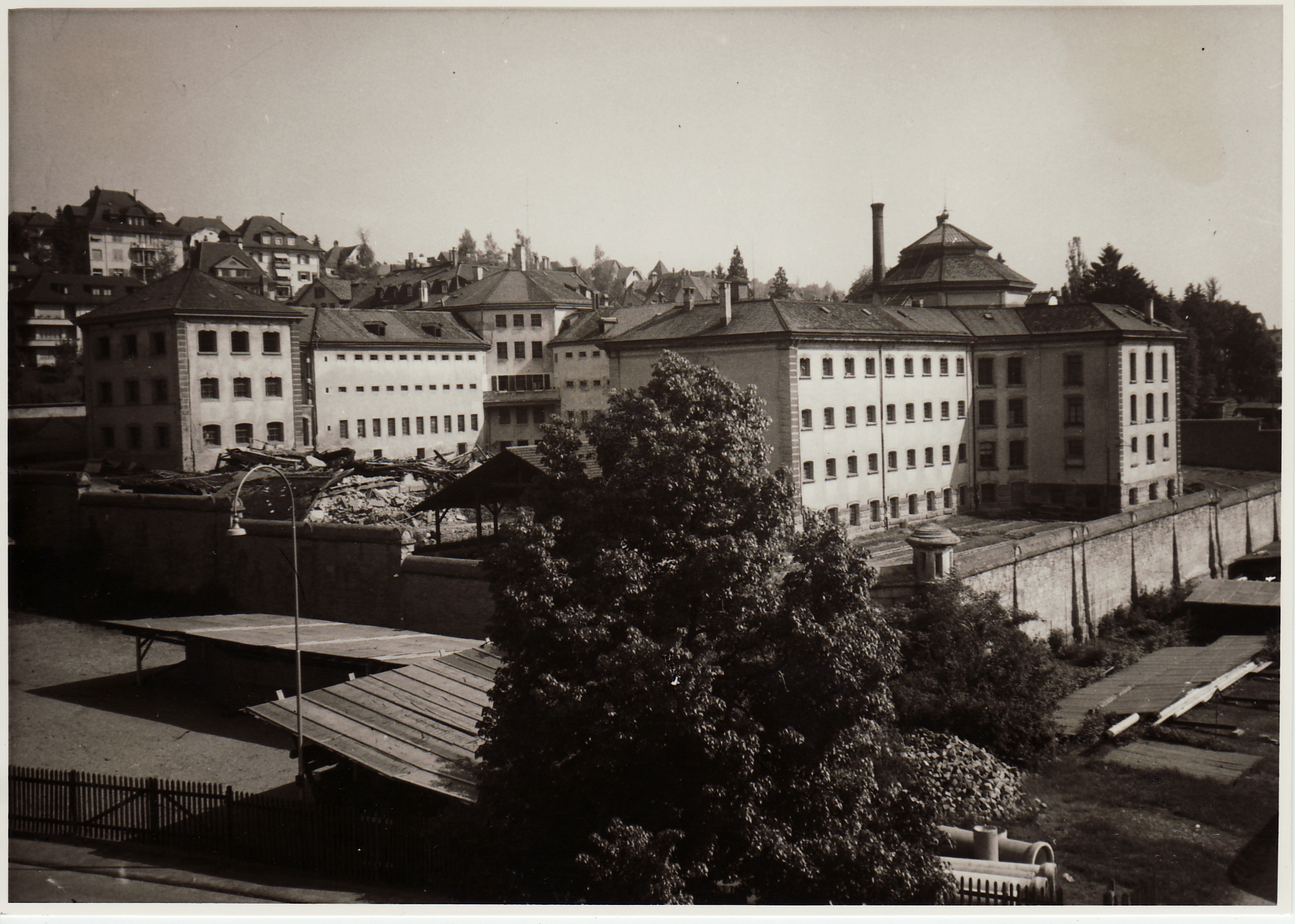 St.Jakob-Strasse, Strafanstalt St.Jakob enthält: Blick gegen Westen; Aufhebung der Strafanstalt am 3. Juli 1956, angezeigt mit der weissen Fahne; Sprengung der Strafanstalt am 15. März 1958